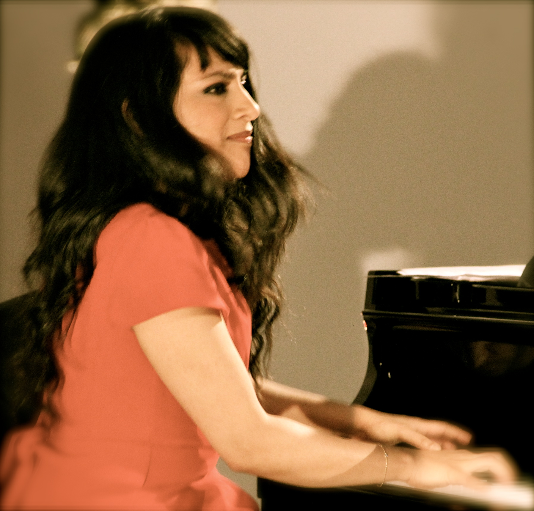 Shani Diluka, pianiste